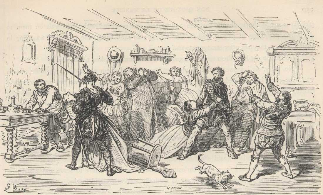 Gustave Doré, ilustração para "Dom Quixote" de Miguel de Cervantes